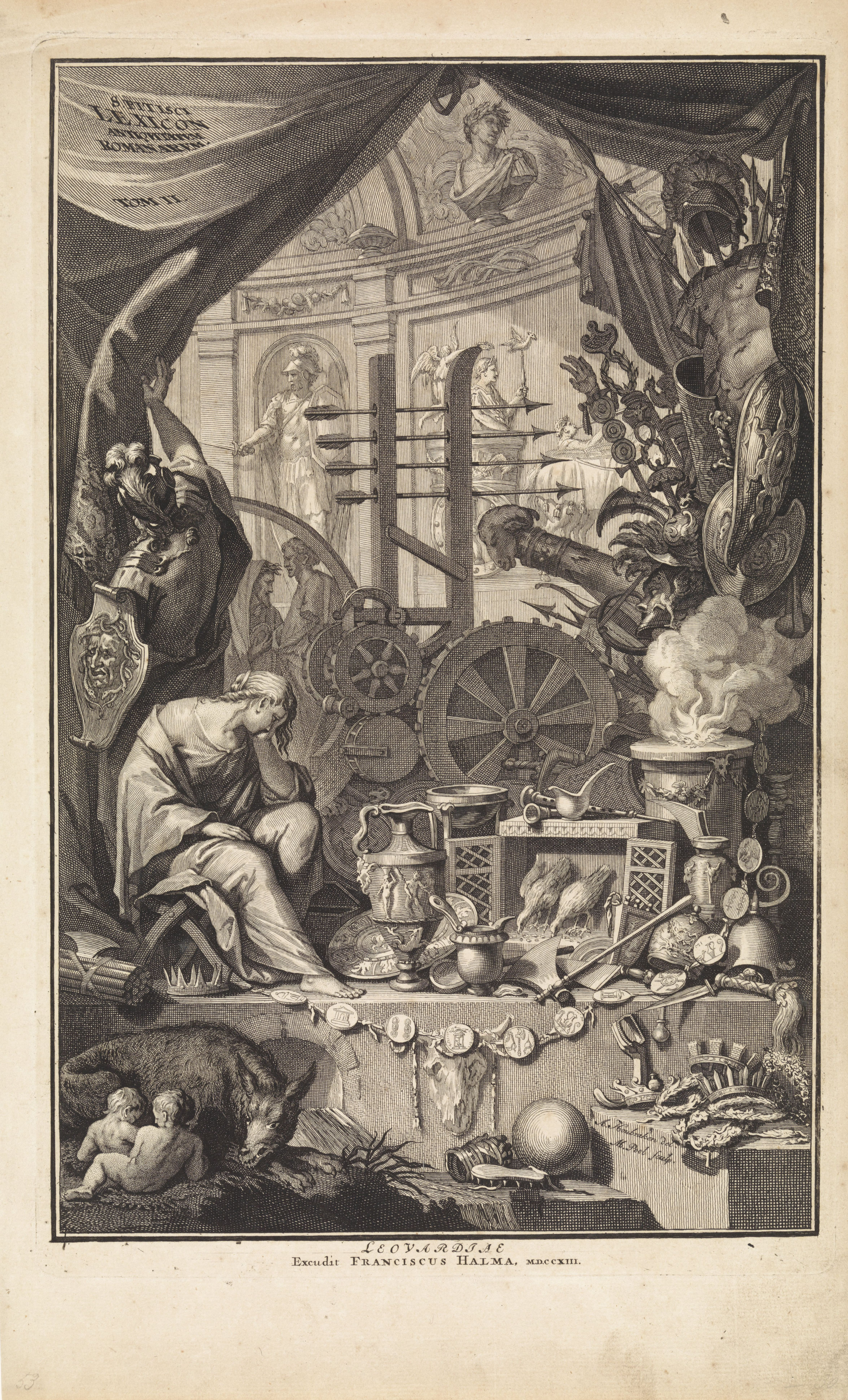 IdentificatieTitel(s): Allegorische titelpagina met diverse verwijzingen naar de stad RomeTitelpagina voor: S. Pitiscus, Lexicon antiquitatum Romanarum, 1713Objecttype: prent titelpagina Objectnummer: RP-P-1912-428Catalogusreferentie: Collectie Rijksmuseum-1(2)Opmerking: staat bepaald aan de hand van aanwezige prenten in RijksprentenkabinetOpschriften / Merken: verzamelaarsmerk, verso, gestempeld: Lugt 2228Omschrijving: Een allegorische vrouwfiguur treurt te midden van allerlei Romeinse antiqiuteiten en wapentuig. Aan haar voeten ligt een kroon en een pijlenbundel. Op de voorgrond de wolvin met Remus en Romulus. Op de achtergrond een nis met standbeelden en bustes van Romeinse keizers en veldheren. Een soldaat schuift een draperie Waar: op de titel het Latijn opzij.VervaardigingVervaardiger: prentmaker: Matthijs Pool (vermeld op object)naar tekening van: Arnold Houbraken (vermeld op object)uitgever: François Halma (vermeld op object)Plaats vervaardiging: prentmaker: Amsterdamuitgever: LeeuwardenDatering: 1713Fysieke kenmerken: gravure en etsMateriaal: papier Techniek: graveren (drukprocedé) / etsenAfmetingen: plaatrand: h 340 mm × b 220 mmToelichtingPrent gebruikt als titelpagina voor: Pitiscus, Samuel. Lexicon antiqvitatvm Romanarvm, deel II. Leeuwarden: François Halma, 1713.OnderwerpWat: cities represented allegorically or symbolically: Rome - city-crown (+ allegorical city with figures, staffage)Romulus and Remus are washed ashore and suckled by a she-wolf; 'Lupa Romana'weaponssculpturemedal (considered as a piece of sculpture, regardless of its specific function)ram's head ~ ornamentWaarRomeVerwerving en rechtenCredit line: Schenking van Kunsthandel Bernard HouthakkerVerwerving: schenking 1912Copyright: Publiek domein